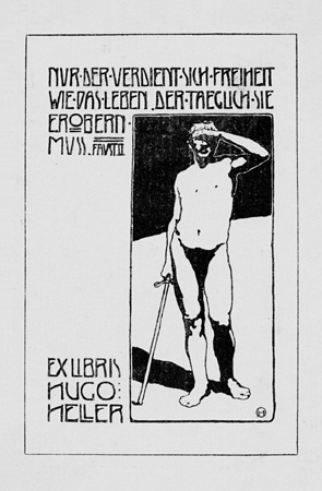 Exlibris Hugo Heller [Das ist der Weisheit letzter Schluss:] // Nur der verdient sich Freiheit wie das Leben, // Der täglich sie erobern muss. Goethe: Faust II, Vers 11574 ff.